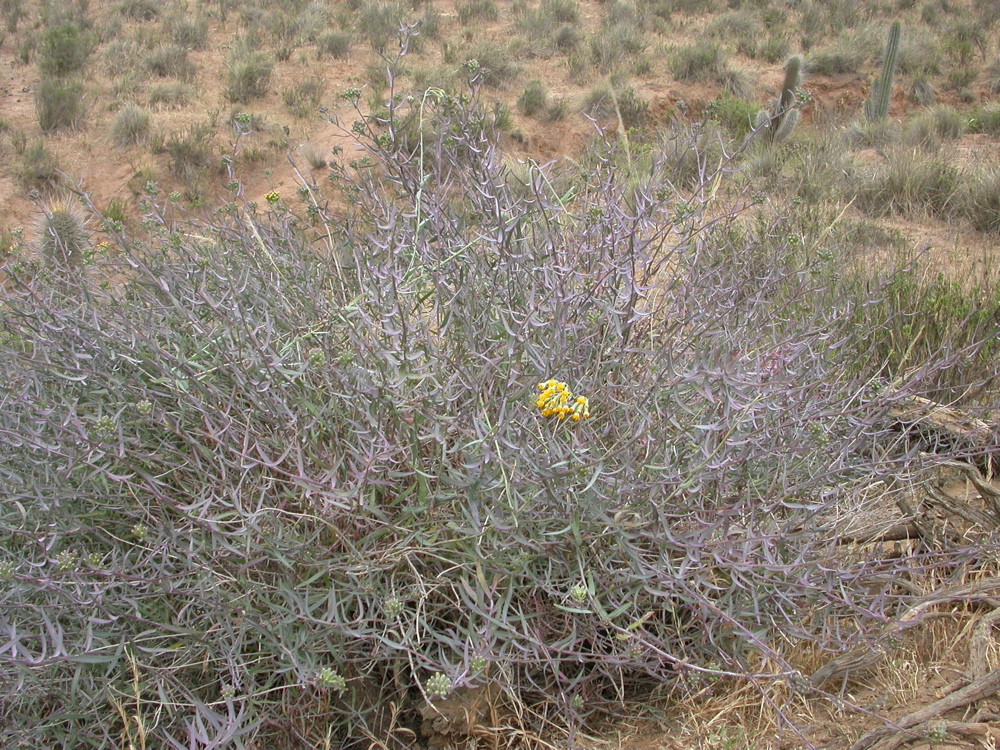 Senecio murorum